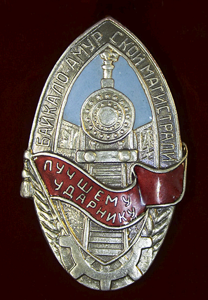 Наградной знак «Лучшему ударнику Байкало-Амурской магистрали». Из Приказа N6 по Строительству Бамлаг ОГПУ: «Правом на получение значка пользуются заключенные Байкало-Амурских исправительных лагерей ОГПУ, проявившие высокую производительность труда, давшие образцовое качество, примеры дисциплинированности и участвующие в общественной работе».